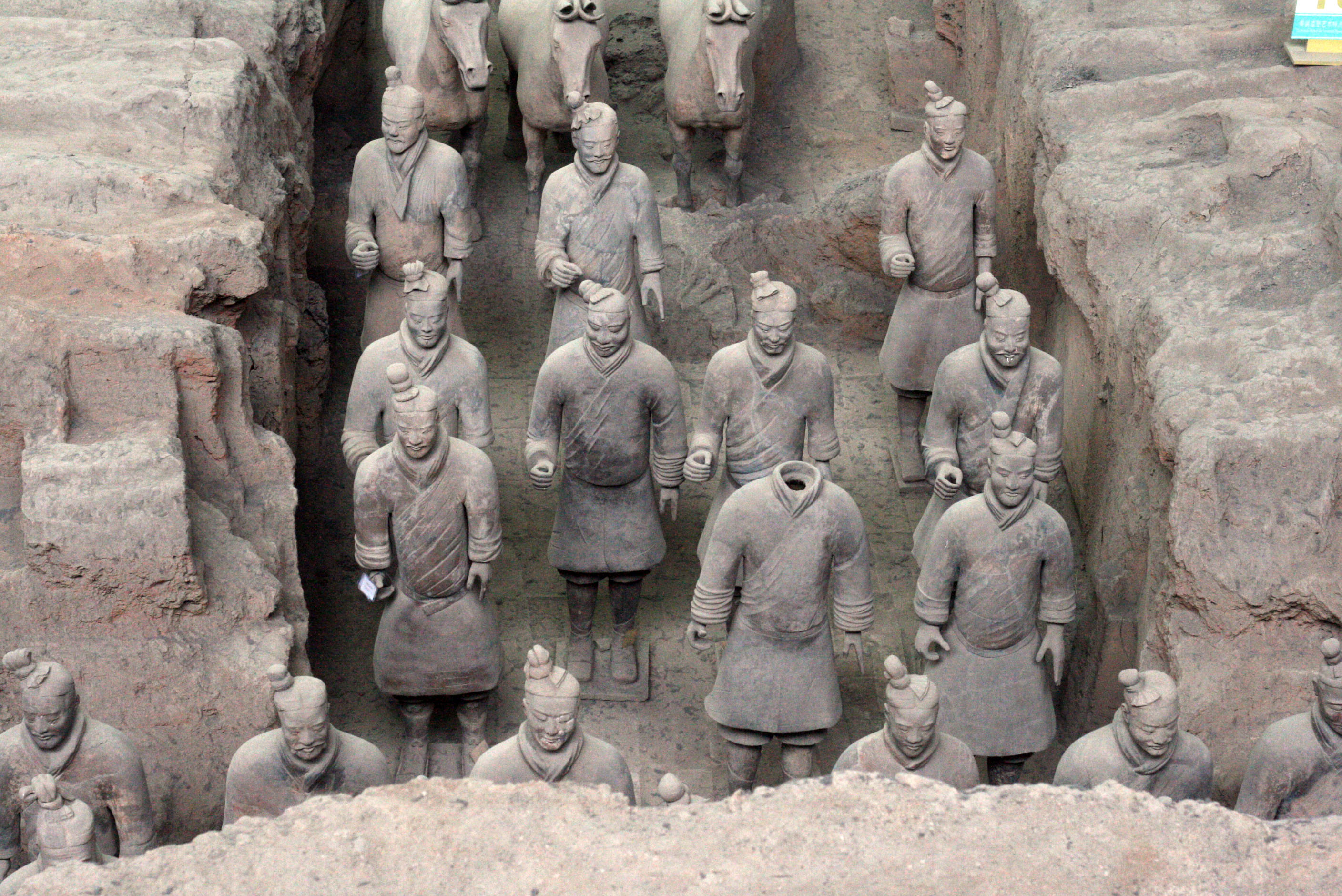 China